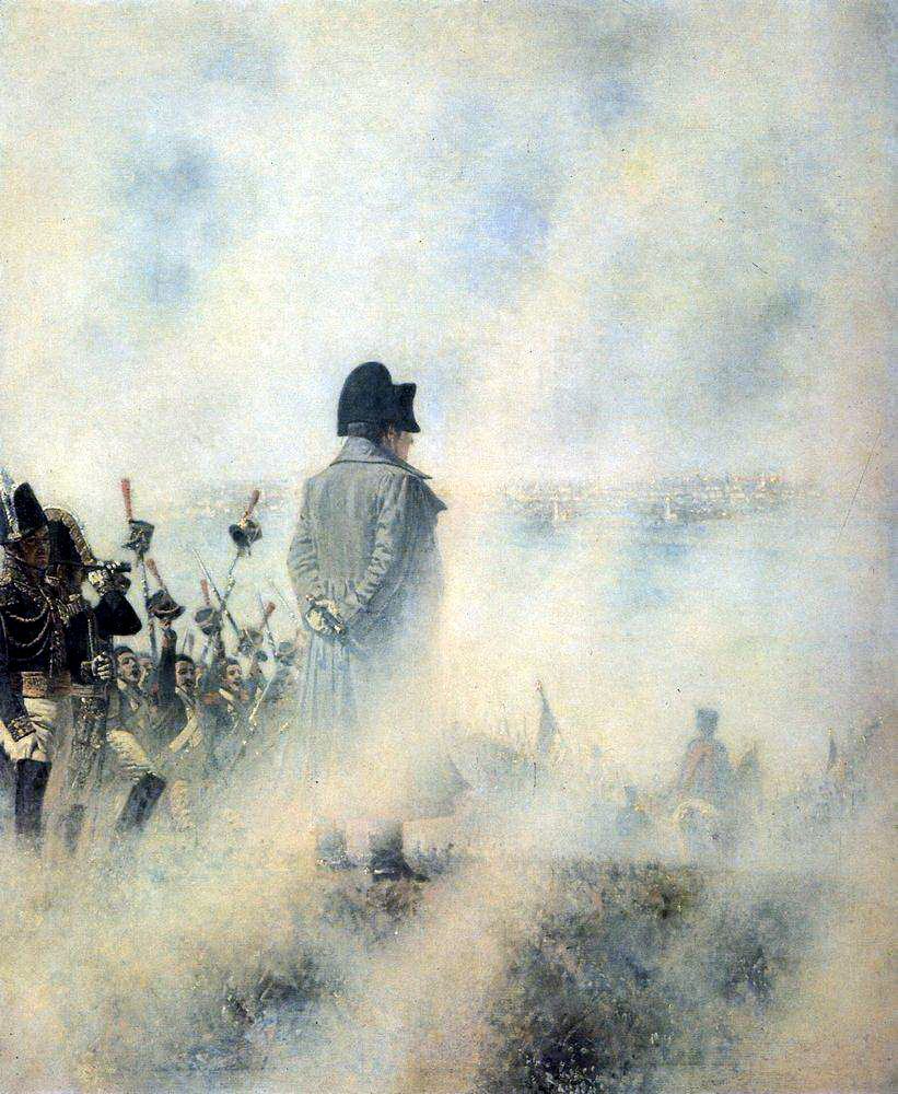 Перед Москвой в ожидании депутации бояр